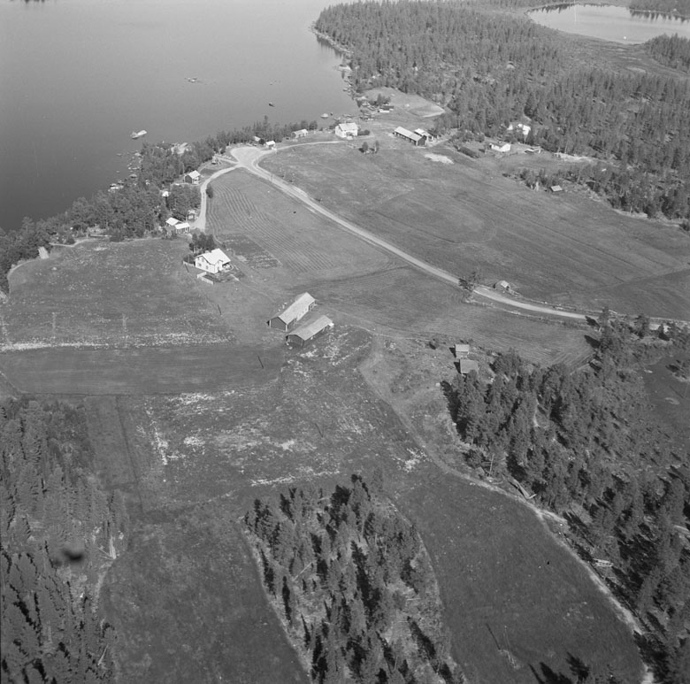 Karats 1:1 och 1:2. Foto mot NO. Motiv: Karats Nyckelord: Flygbilder Kategori: Fjällmiljö, Bondgård Karats 1:1 och 1:2. Foto mot NO.